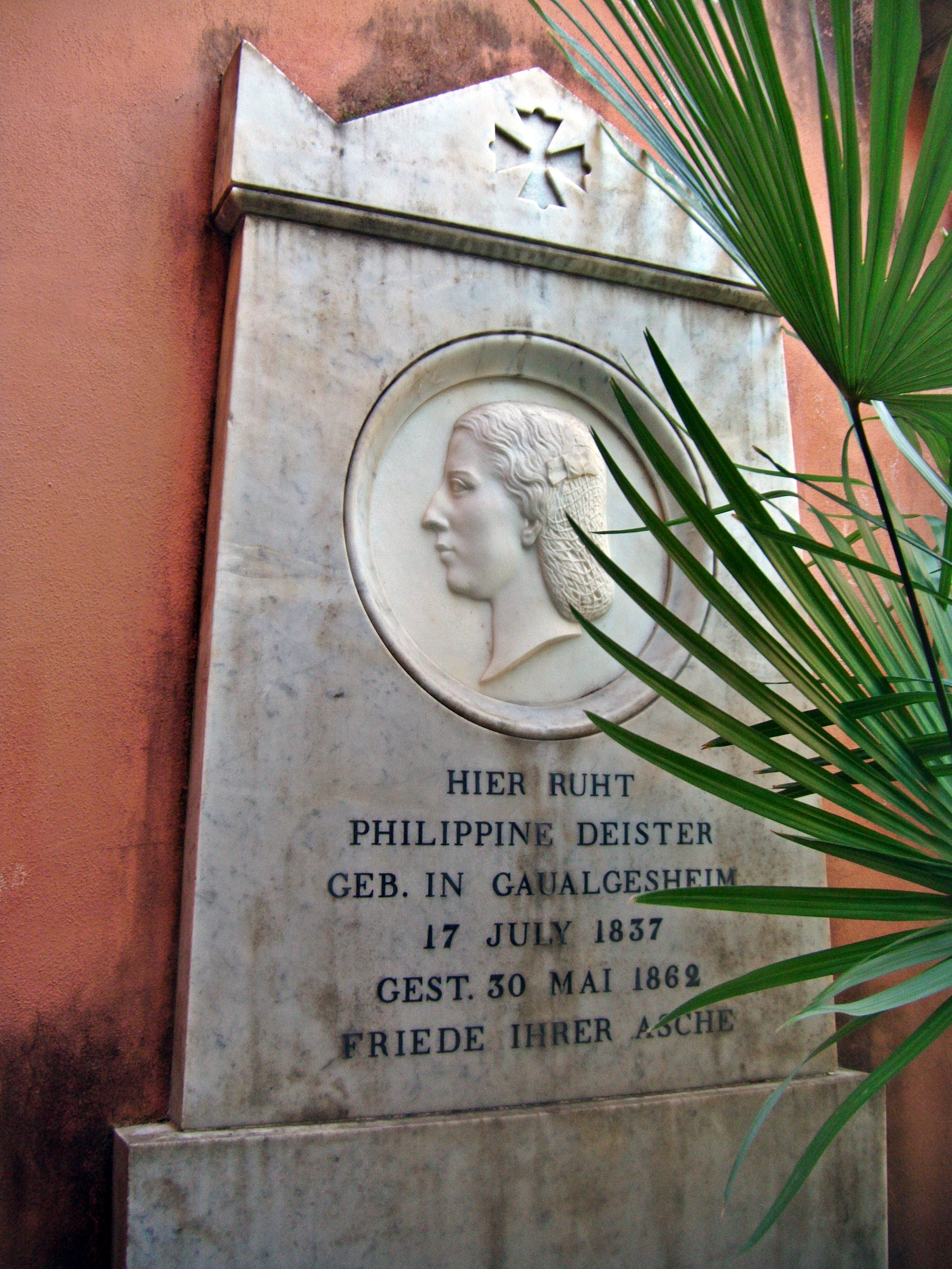 Grabstein der Philippine Deister (1837–1862) aus Gau Algesheim, Campo Santo Teutonico, Rom.